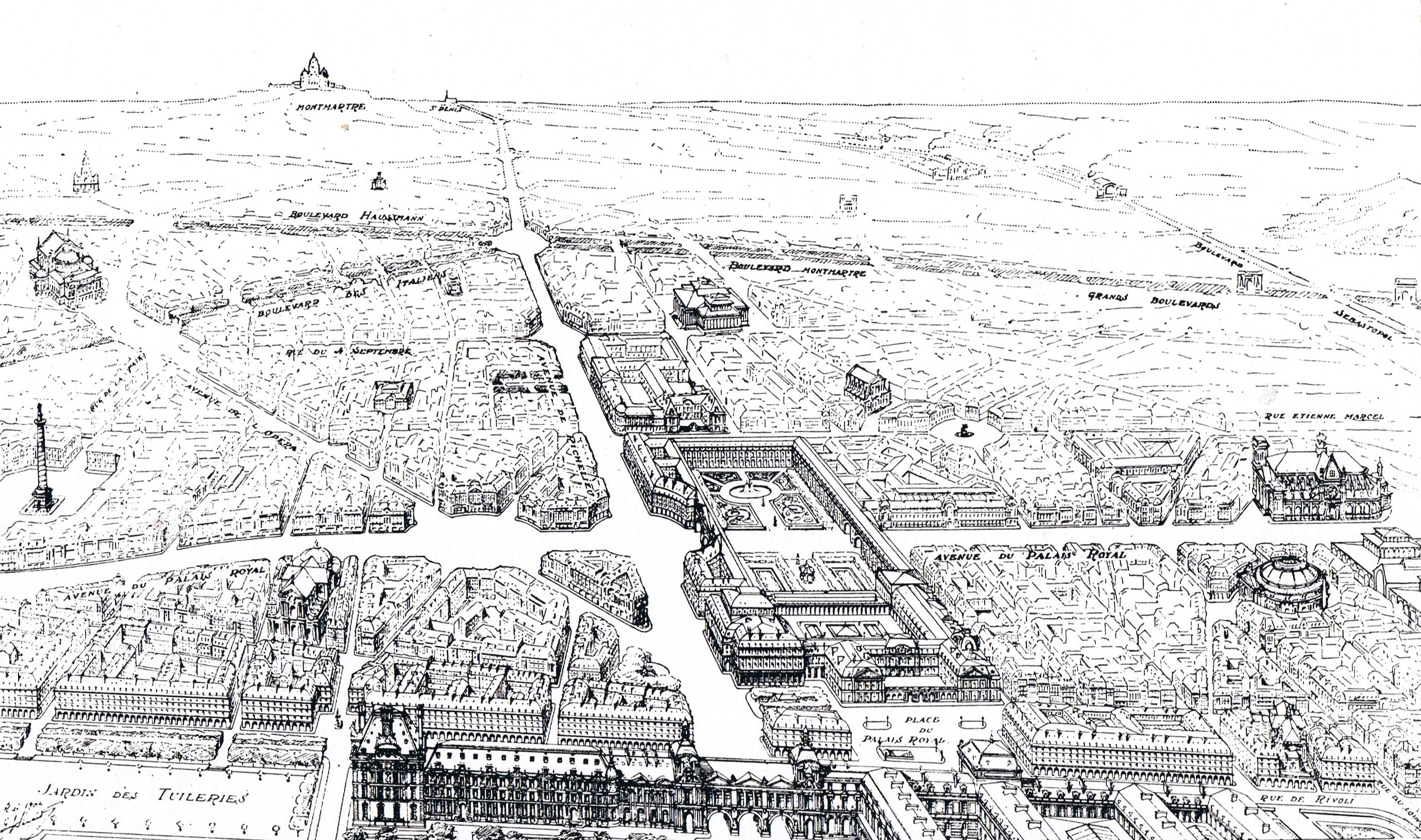 Perspective du Palais-Royal et de la nouvelle grande croisée de Paris; plan-projet par Eugène Hénard, 1904